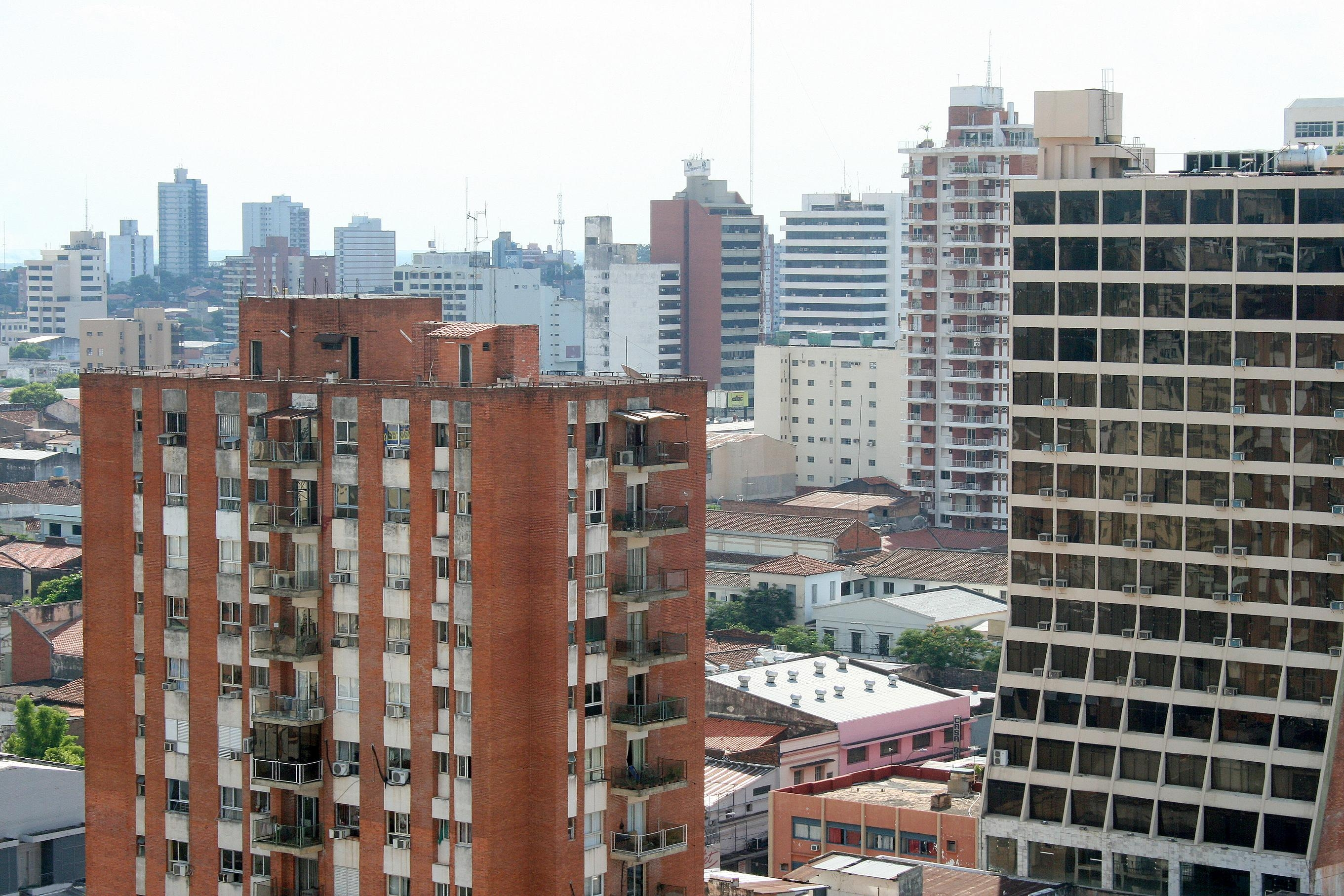 Vista panorámica de Asunción Paraguay, capital de la República.